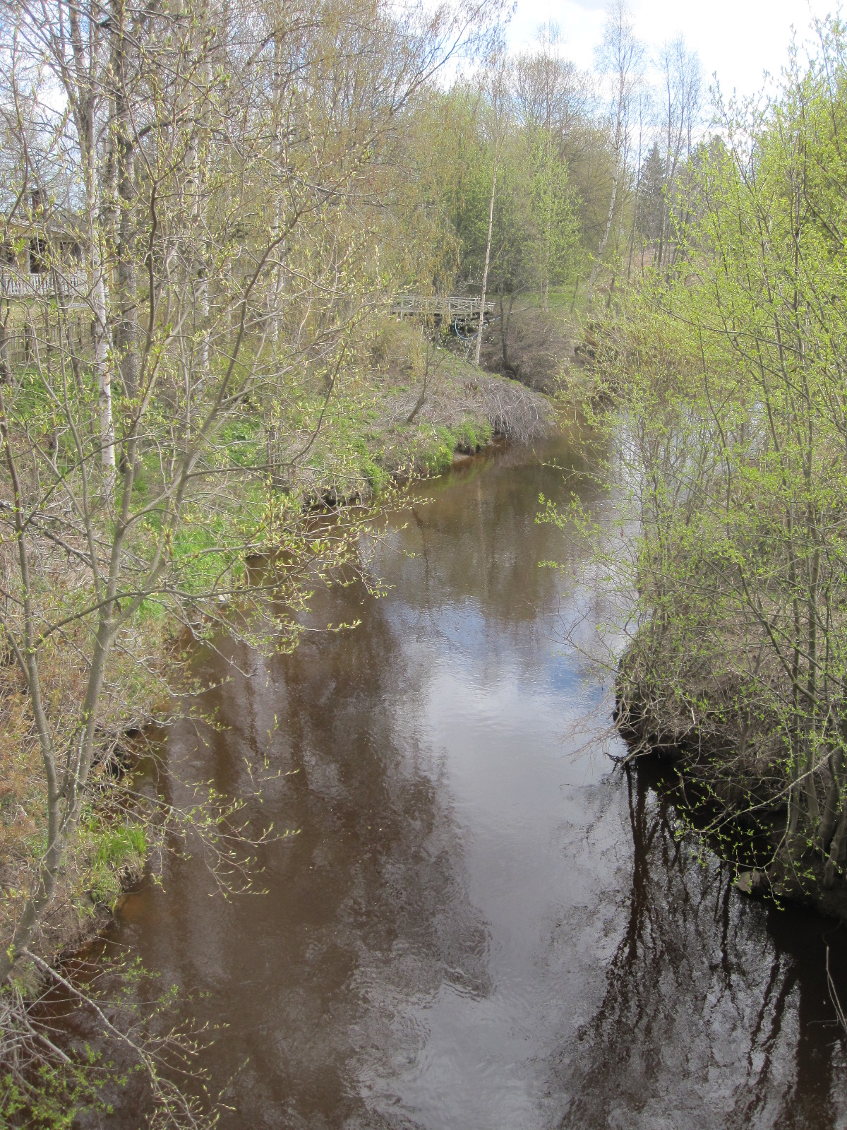 Ängeslevänjoki Tyrnävän Jokisillan kylässä idän suuntaan katsottuna.